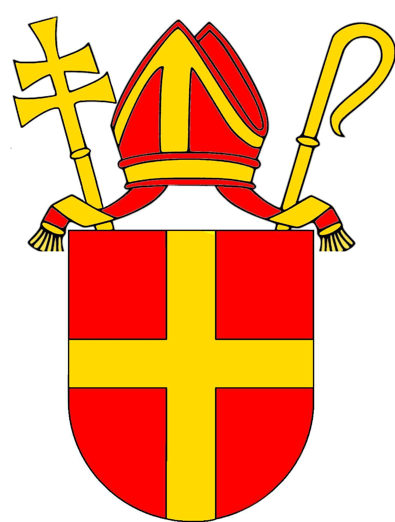 Wappen Erzbistim Paderborn